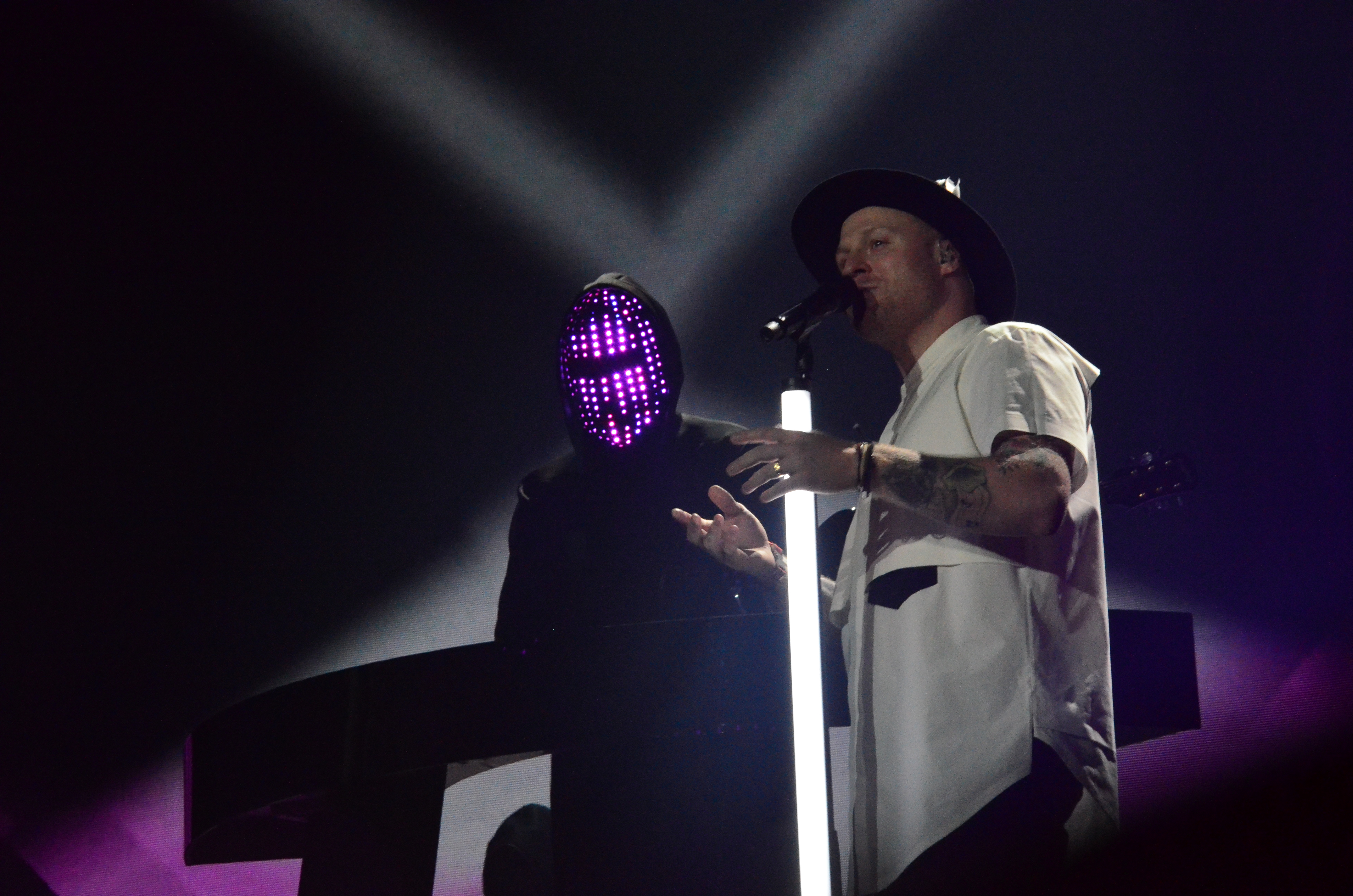 12 травня. Генеральна репетиція фіналу Євробачення 2017. JOWST (Norway)